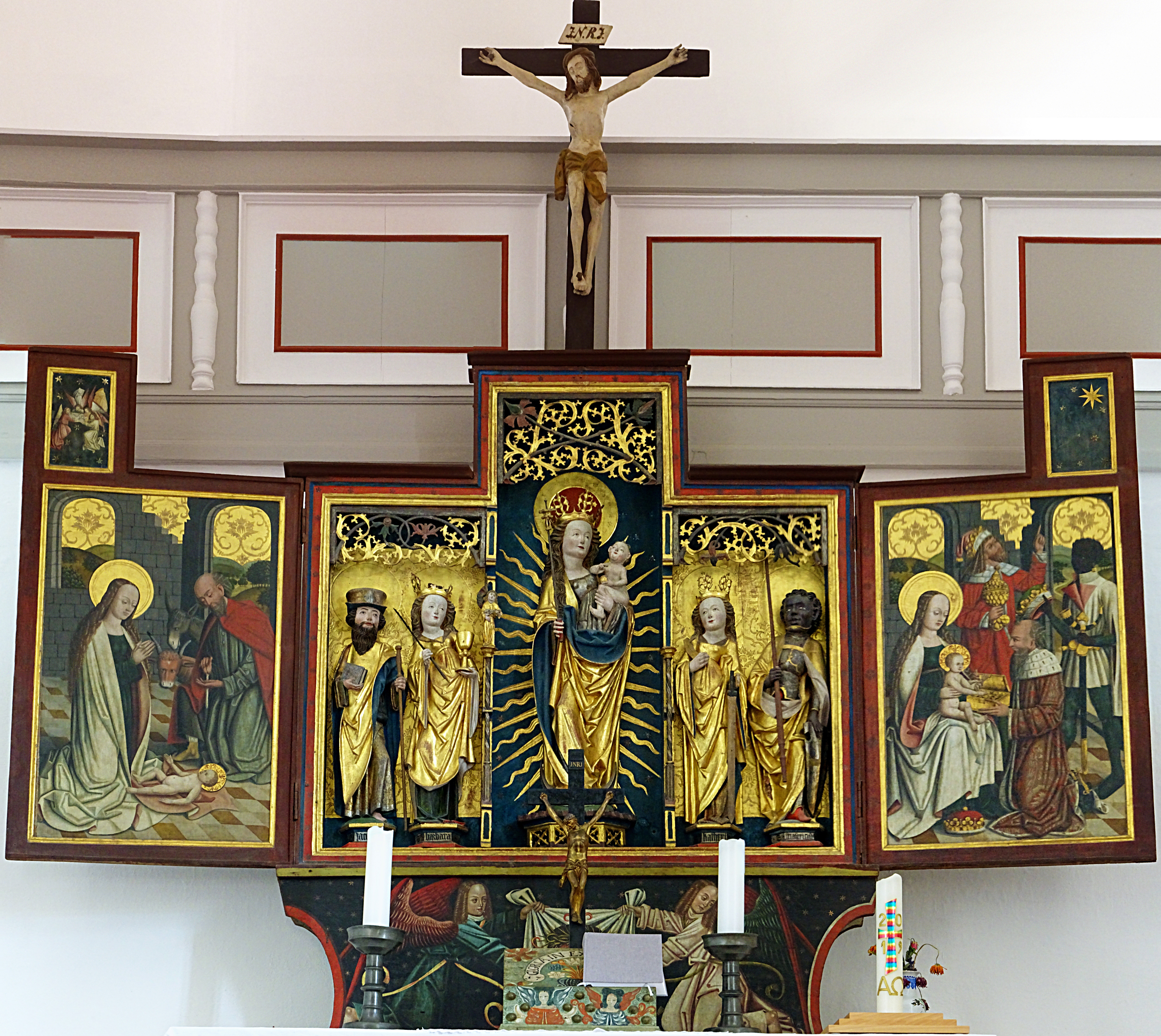 St. Jakobus (Rottenbach), gotischer Schnitzaltar aus der Saalfelder Werkstatt des Valentin Lendenstreich von 1498. Im Mittelschrein Maria als Himmelskönigin mit dem Jesuskind im Strahlenkranz auf einer Mondsichel; umgeben (v.l.n.r.) von den Heiligen Jakobus d.Ä., Barbara, Katharina, Mauritius. Der geöffnete linke Seitenflügel zeigt die Geburt Jesu, in der Ecküberhöhung musizieren 3 Engel. Der rechte Seitenflügel zeigt die Anbetung der Weisen aus dem Morgenland, darüber der Stern von Bethlehem.[1]